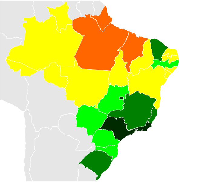 Mapa dos estados brasileiros por número de médicos registrados para cada grupo de mil habitantes em 2013.